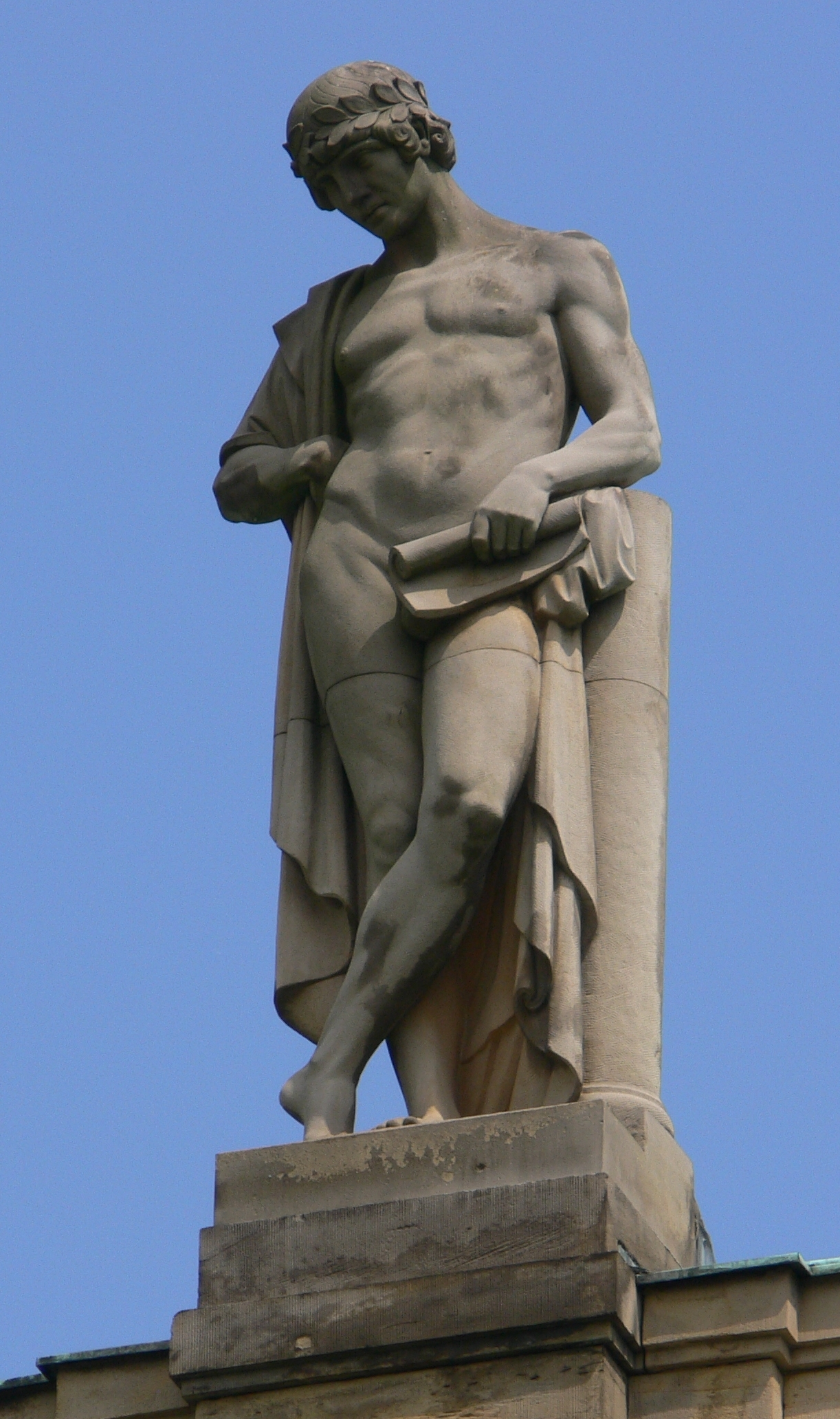 Allegorie der Lyrik von Karl Donndorf, 7. Attikafigur (von links) auf dem Portikus des Großen Hauses der Staatstheater Stuttgart, 1912.